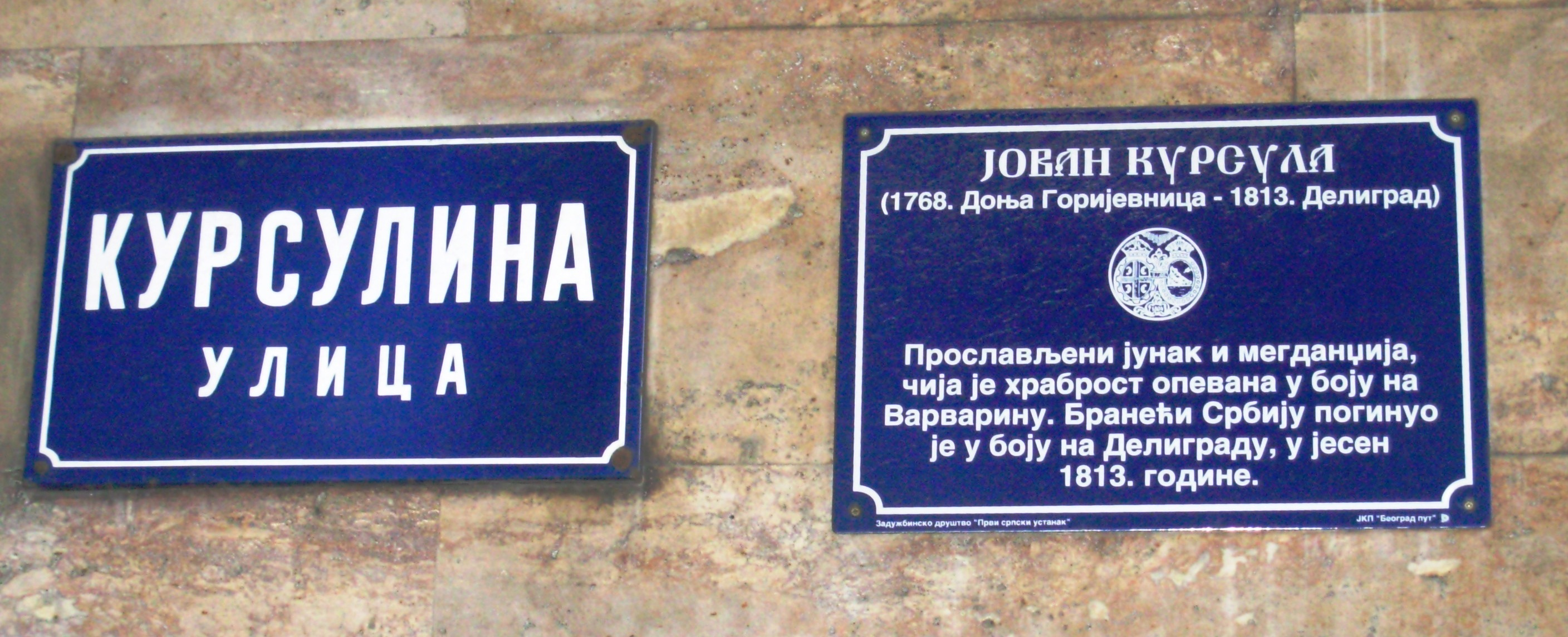 Табла - Курсулина улица у Београду. Сликао Голдфингер